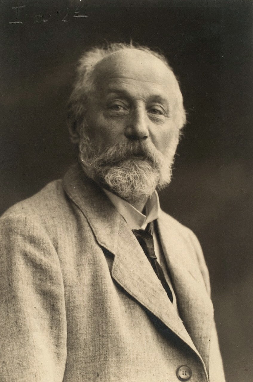 Alfred von Domaszewski (1856–1927), deutscher Althistoriker, 1887–1924 Professor an der Universität Heidelberg